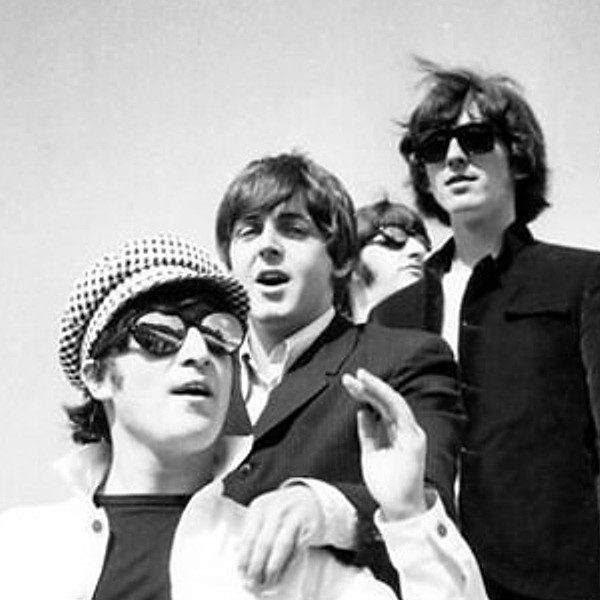 Los Beatles a su llegada a Madrid el 1 de julio de 1965.